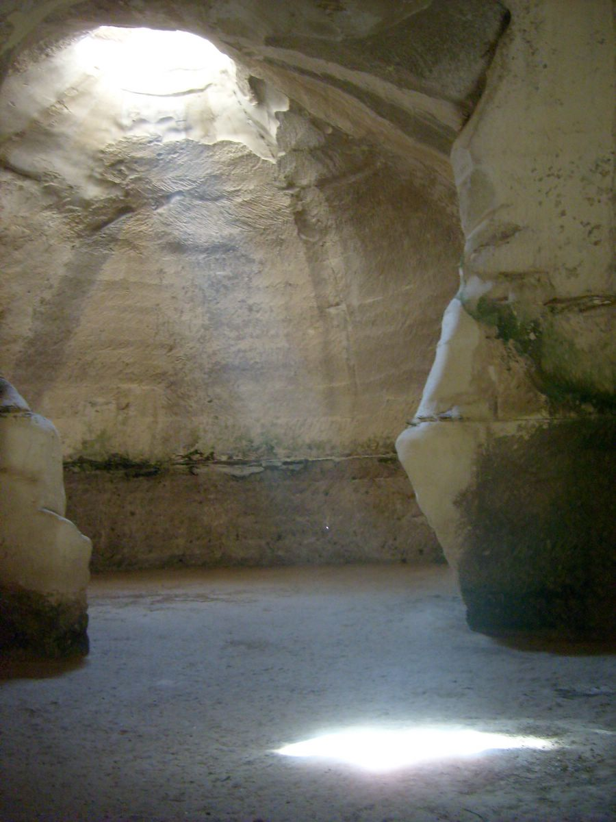 מערת פעמון בבית גוברין